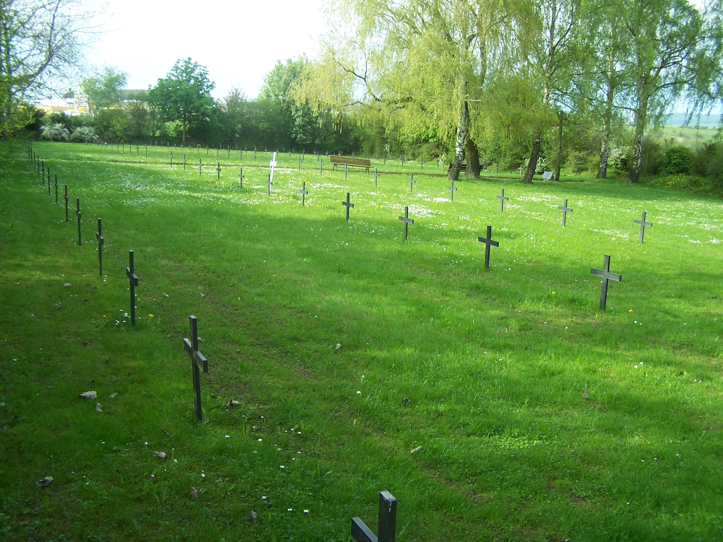 Eisenach, Dürrer Hof, Soldatenfriedhof